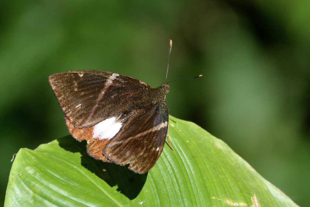 Castniomera atymnius futilis Manzanillo, Costa Rica